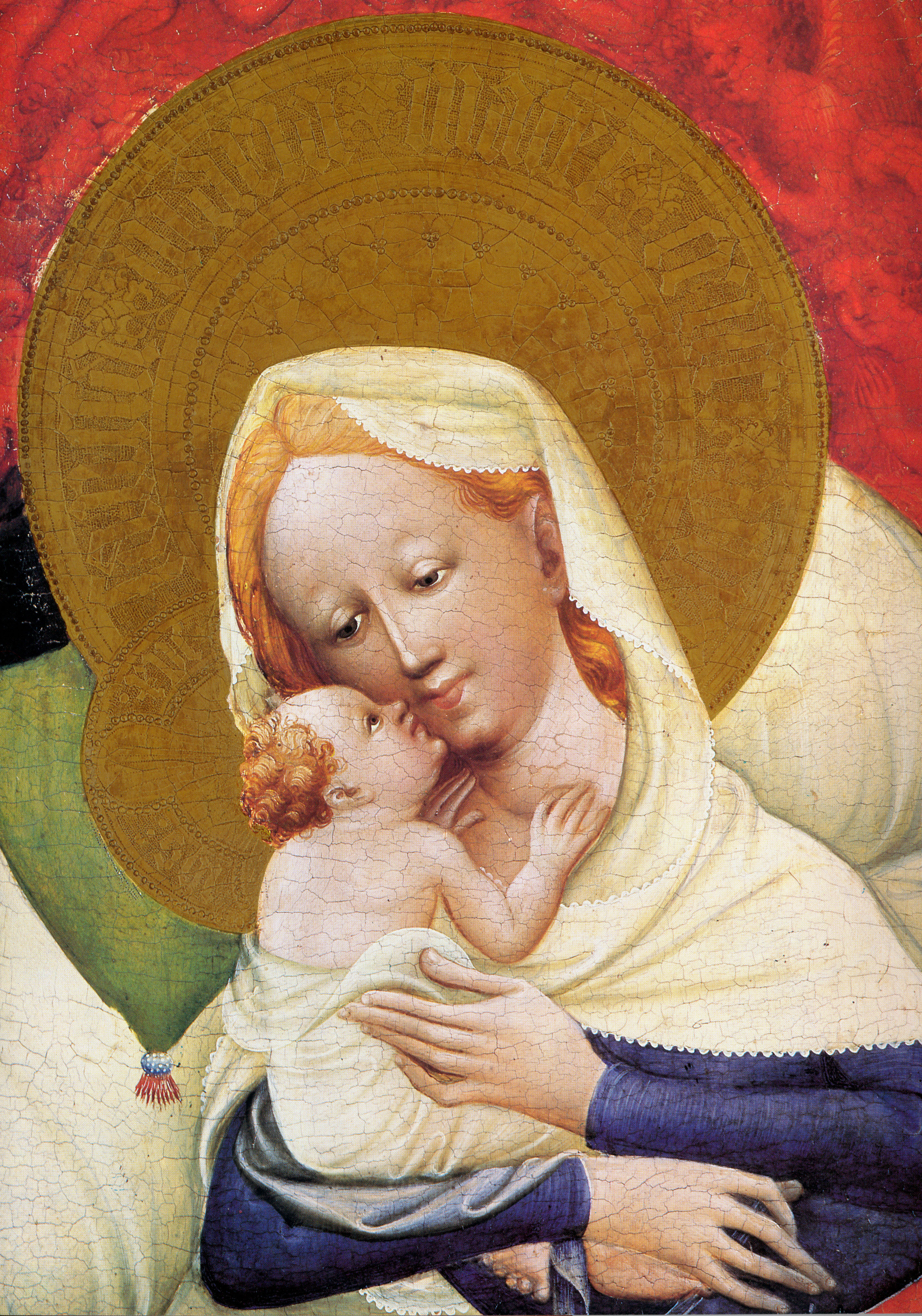 Marienalter - Linke Tafeldetail